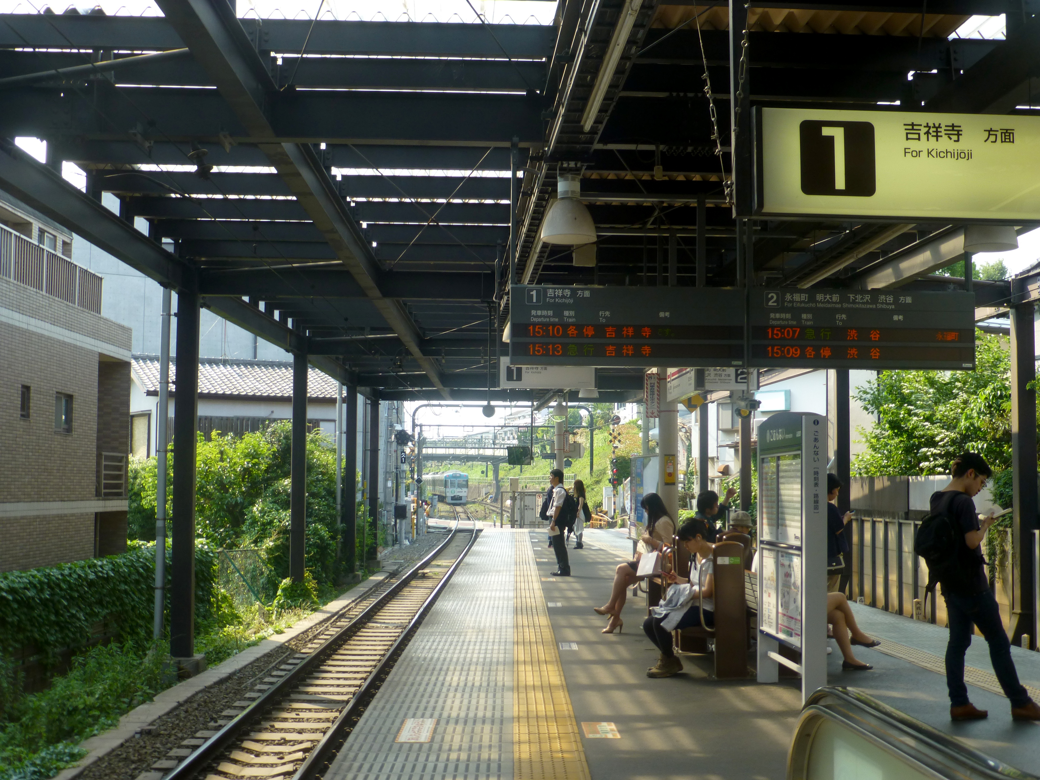 Kugayama Station platform (久我山駅のホーム)